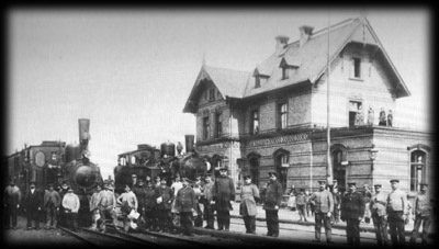 Bahnhof Gau-Odernheim im Jahr 1904, der Strecken Amiche und Bahnstrecke Osthofen–Gau-Odernheim